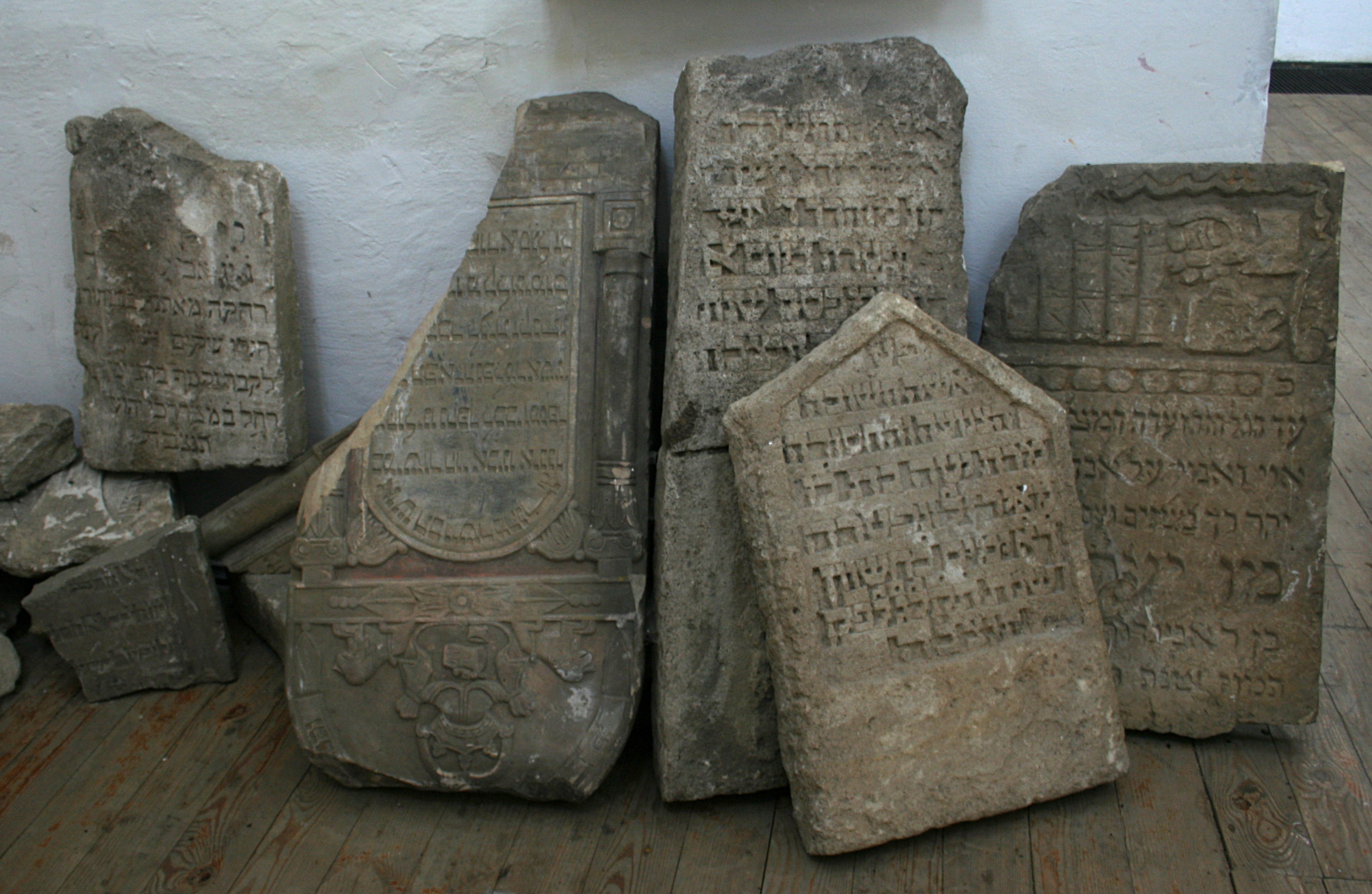 Synagoga w Szydłowie - macewy we wnętrzu